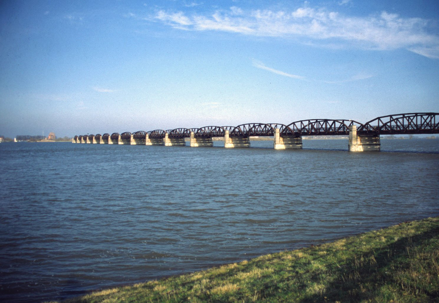 Dömitz - alte Eisenbahnbrücke